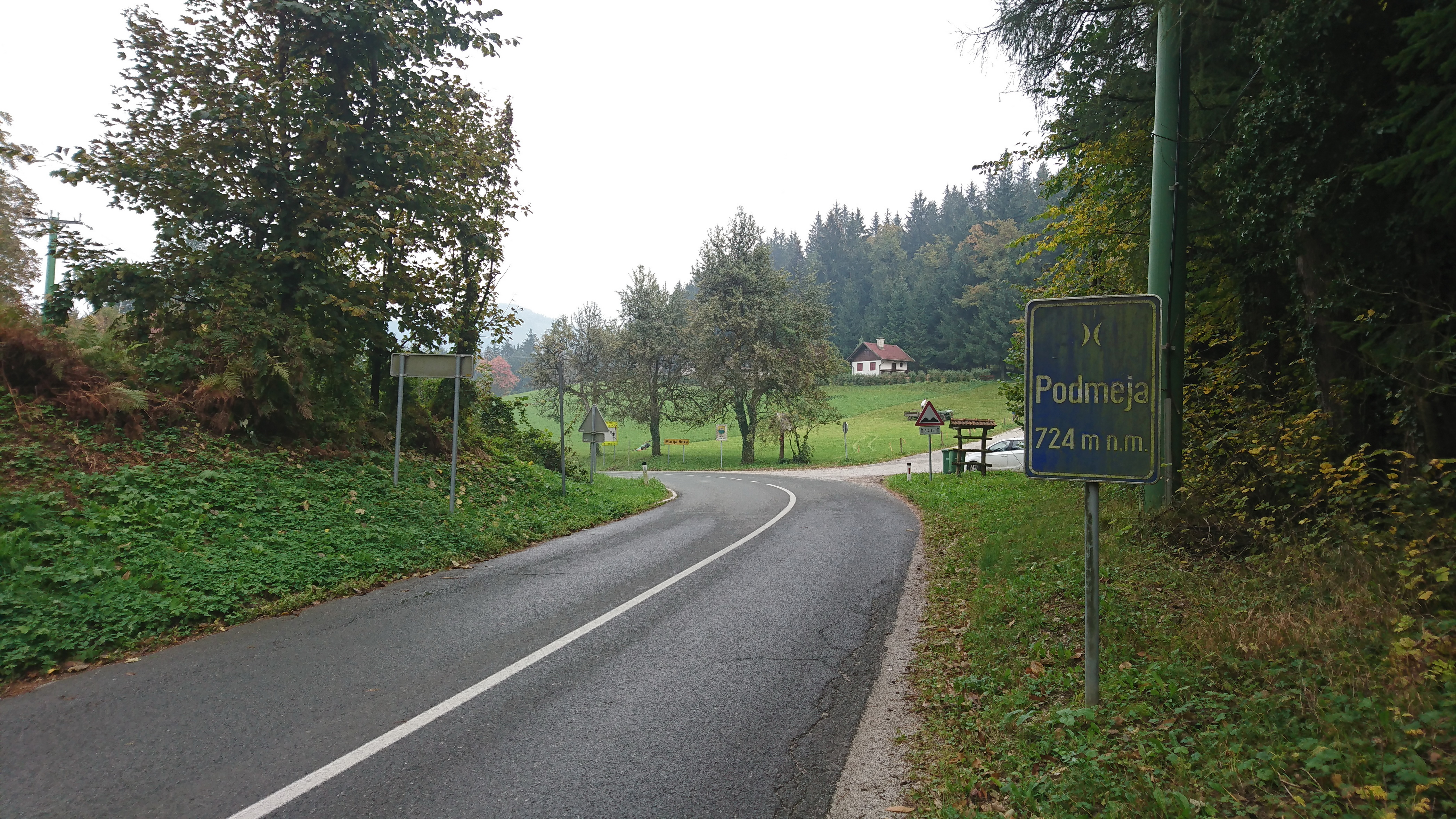 Zgornja točka cestnega prelaza Podmeja, pogled proti Preboldu.